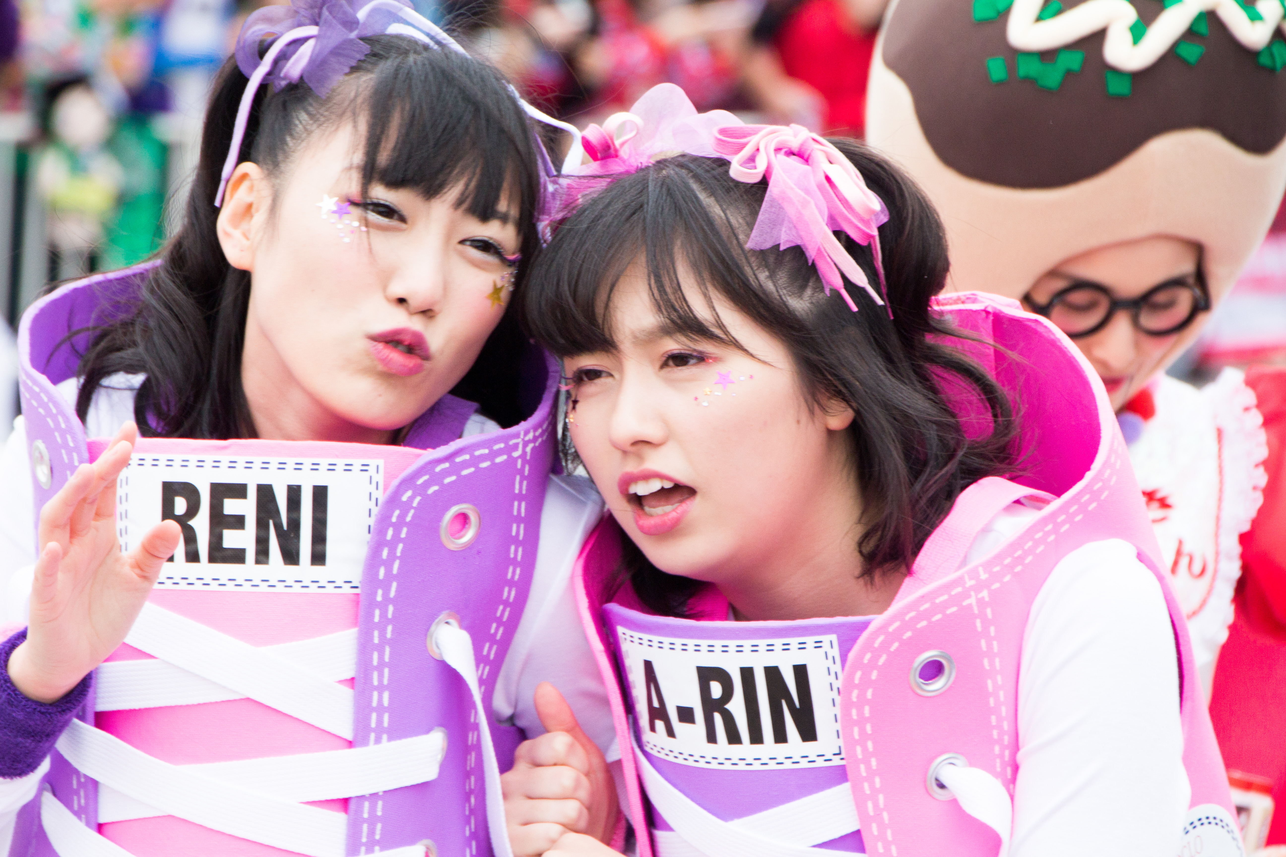 T-SPOOK 2016 高城れに 佐々木彩夏 (ももいろクローバーZ)